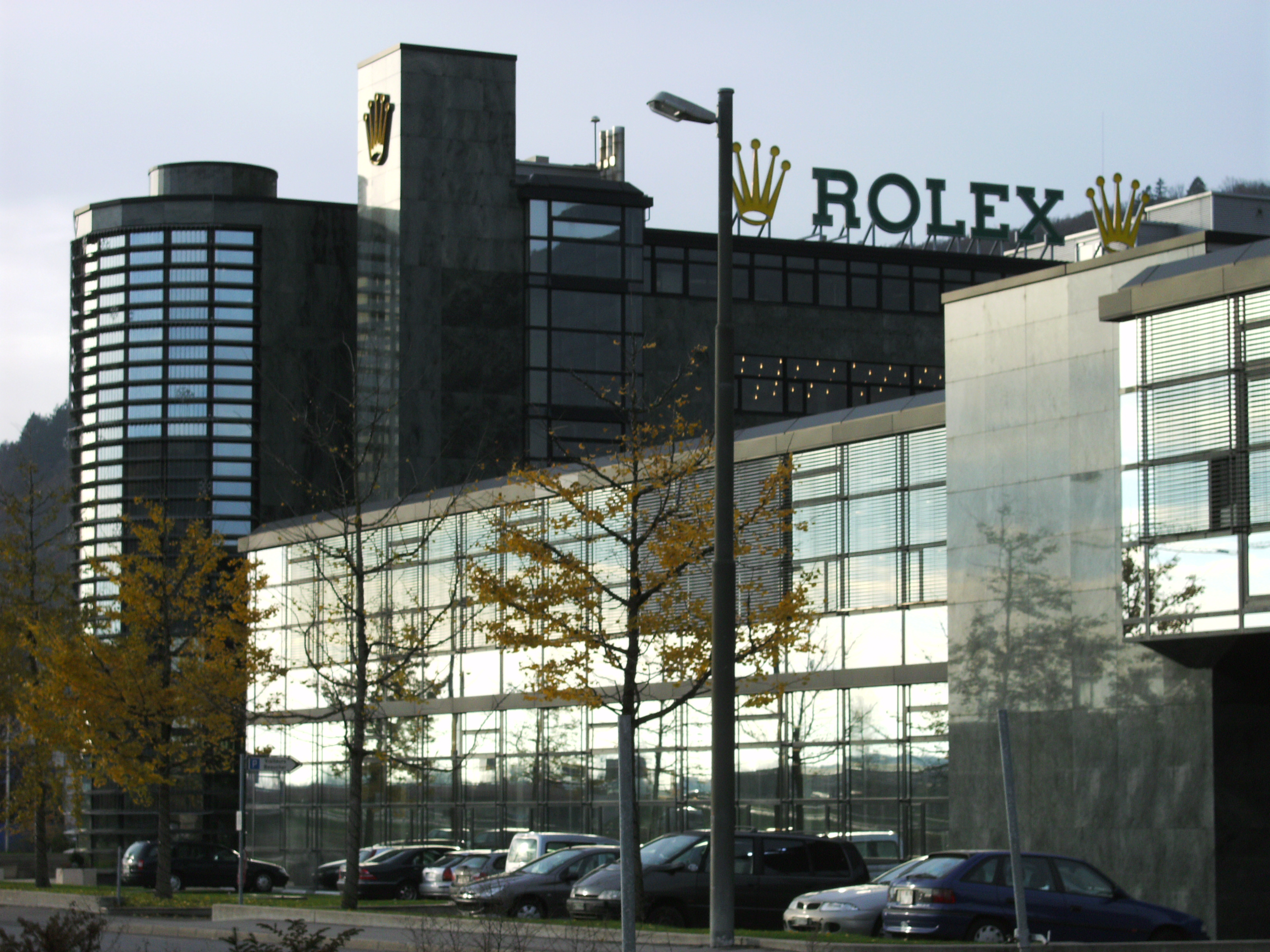 Bâtiment de la société Rolex à Bienne (canton de Berne, Suisse)